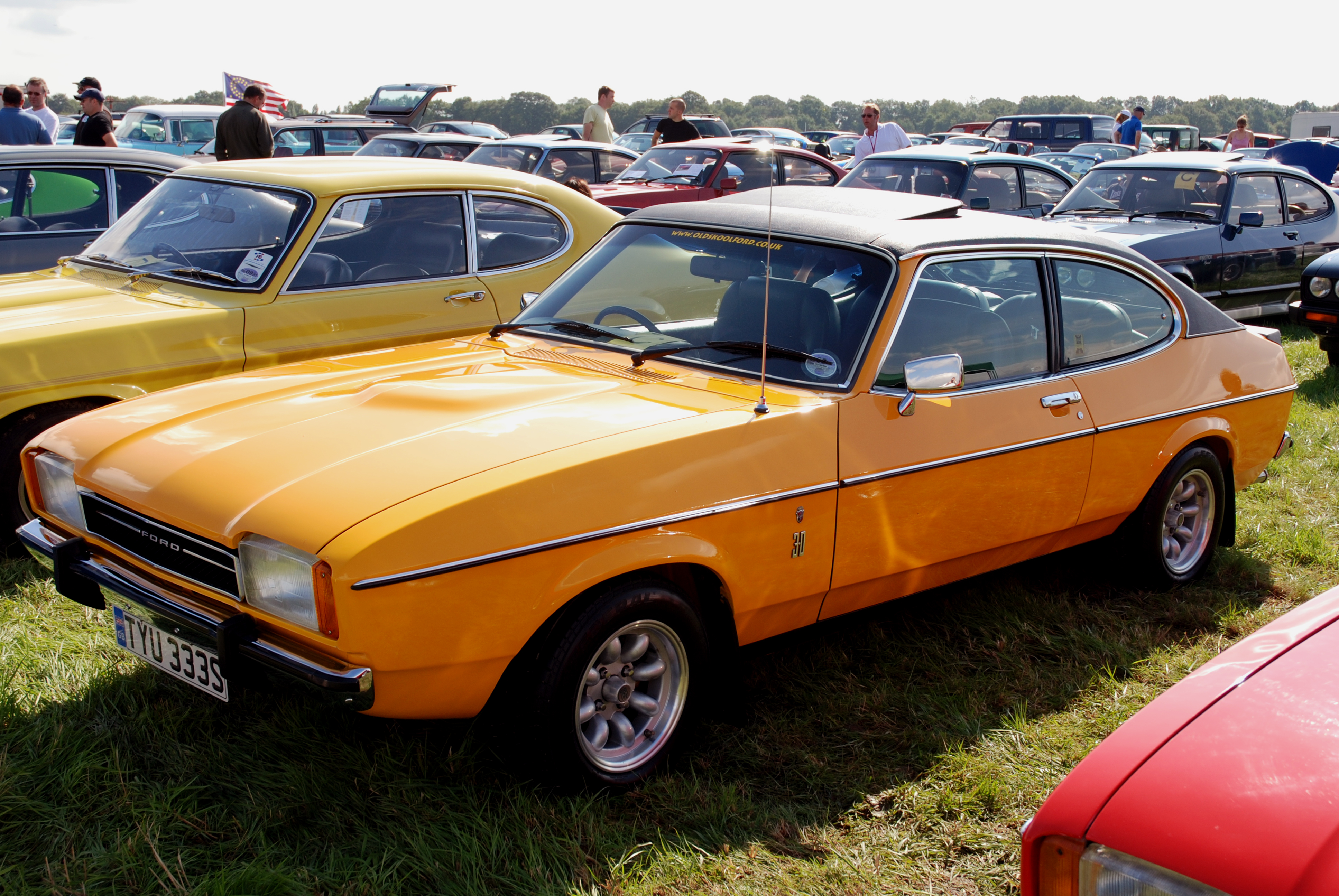 @ Dunsfold Wheels and Wings 2007